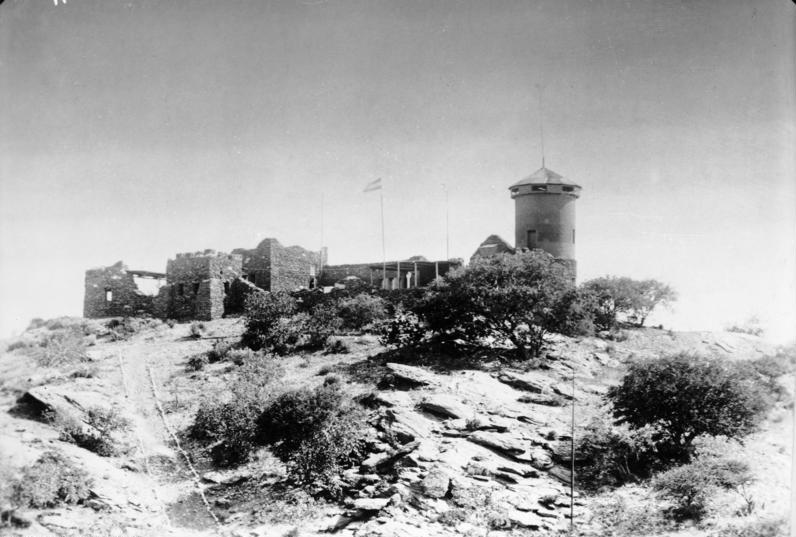 Windhuk-Sperlingslust